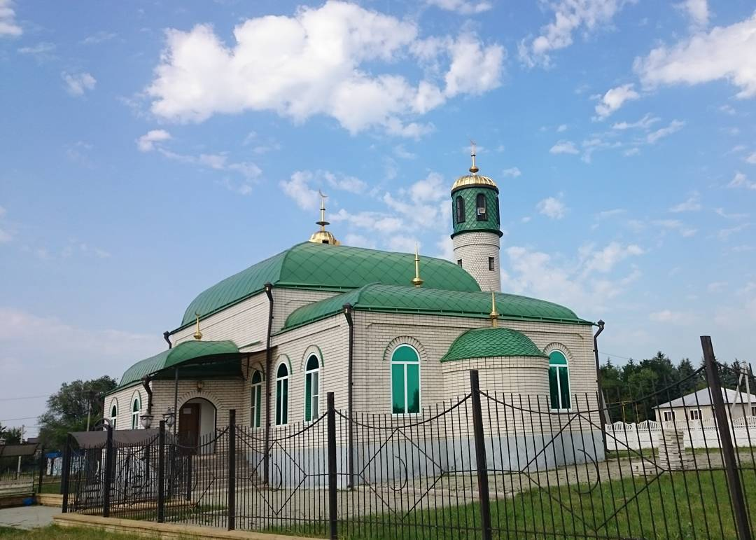 Мечеть в ауле Апсуа